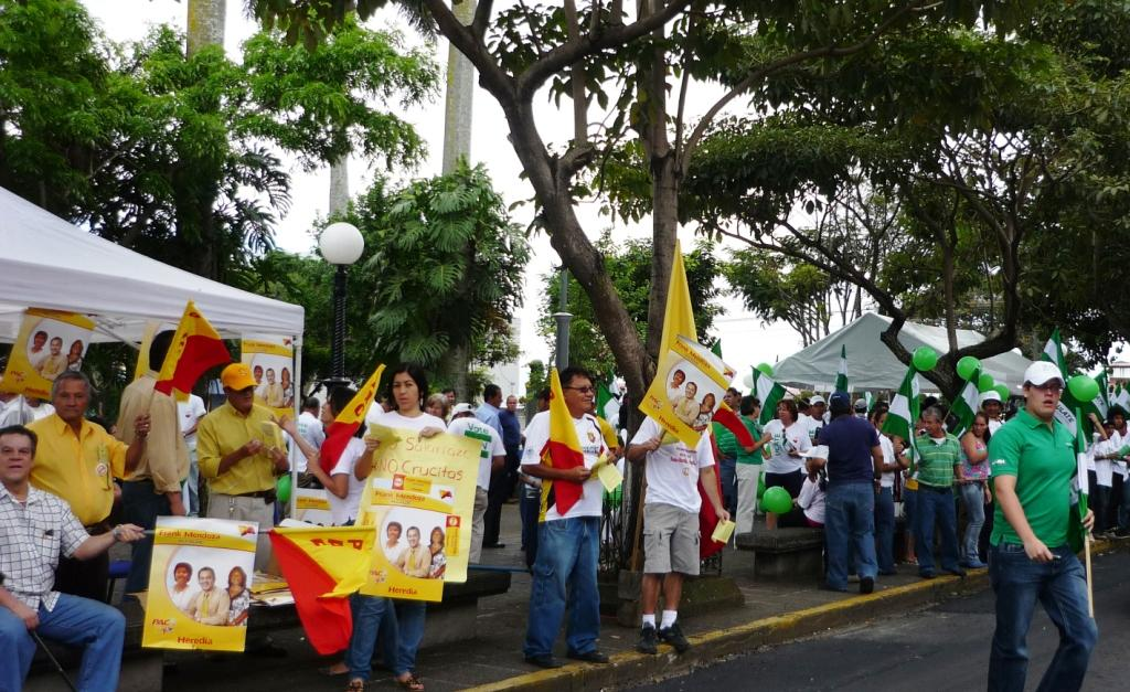 La democracia en Costa Rica se caracteriza por el absoluto respeto a la libertad de preferencias partidarias e ideológicas y su expresión, mincluso conjunta o entre familia